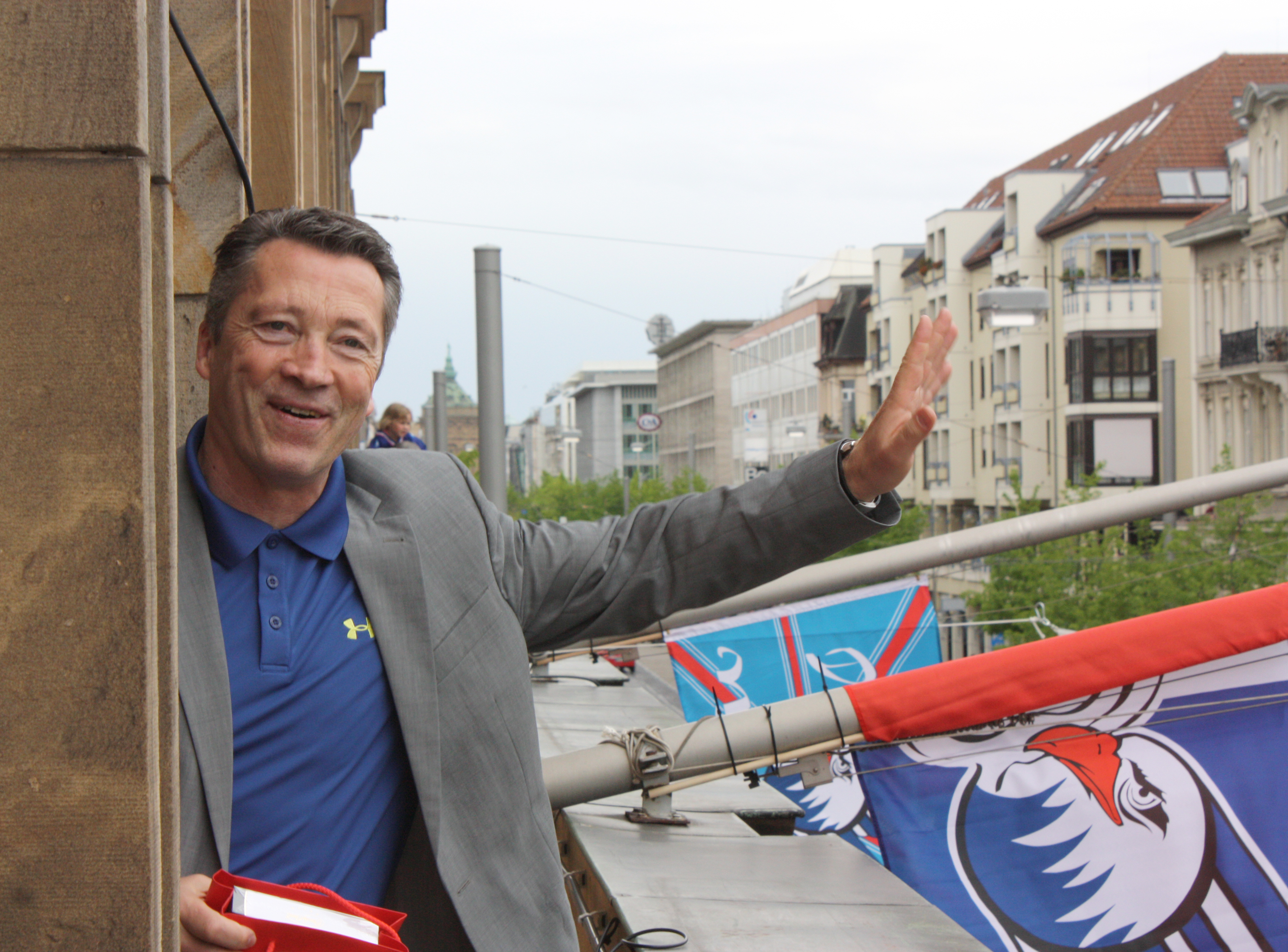 Trainer Harold Kreis.